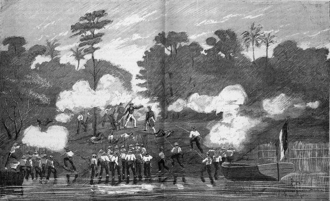 Le commandant E. Bouët-Willaumez attaque et chatie les peuplades insurgées de Grand-Bassam (...). (Colonel Frey, Côte occidentale d'Afrique, 1890 (Pl. en dble page avant p.286 :] [Cote : Réserve A 200 386]